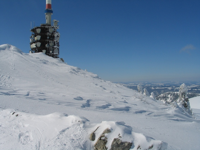 Le Chasseral en hiver. Auteur: Delley Sébastien